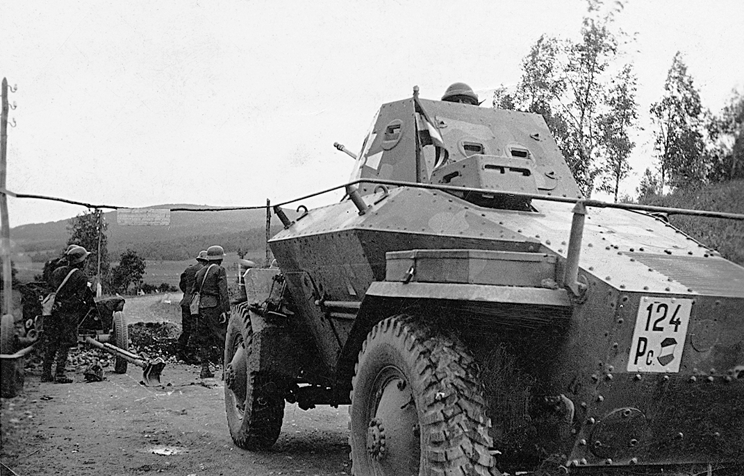 39M Csaba páncélautó. Tags: armoured car, military, number plate, cannon, Hungarian brand Title: 39M Csaba páncélautó.